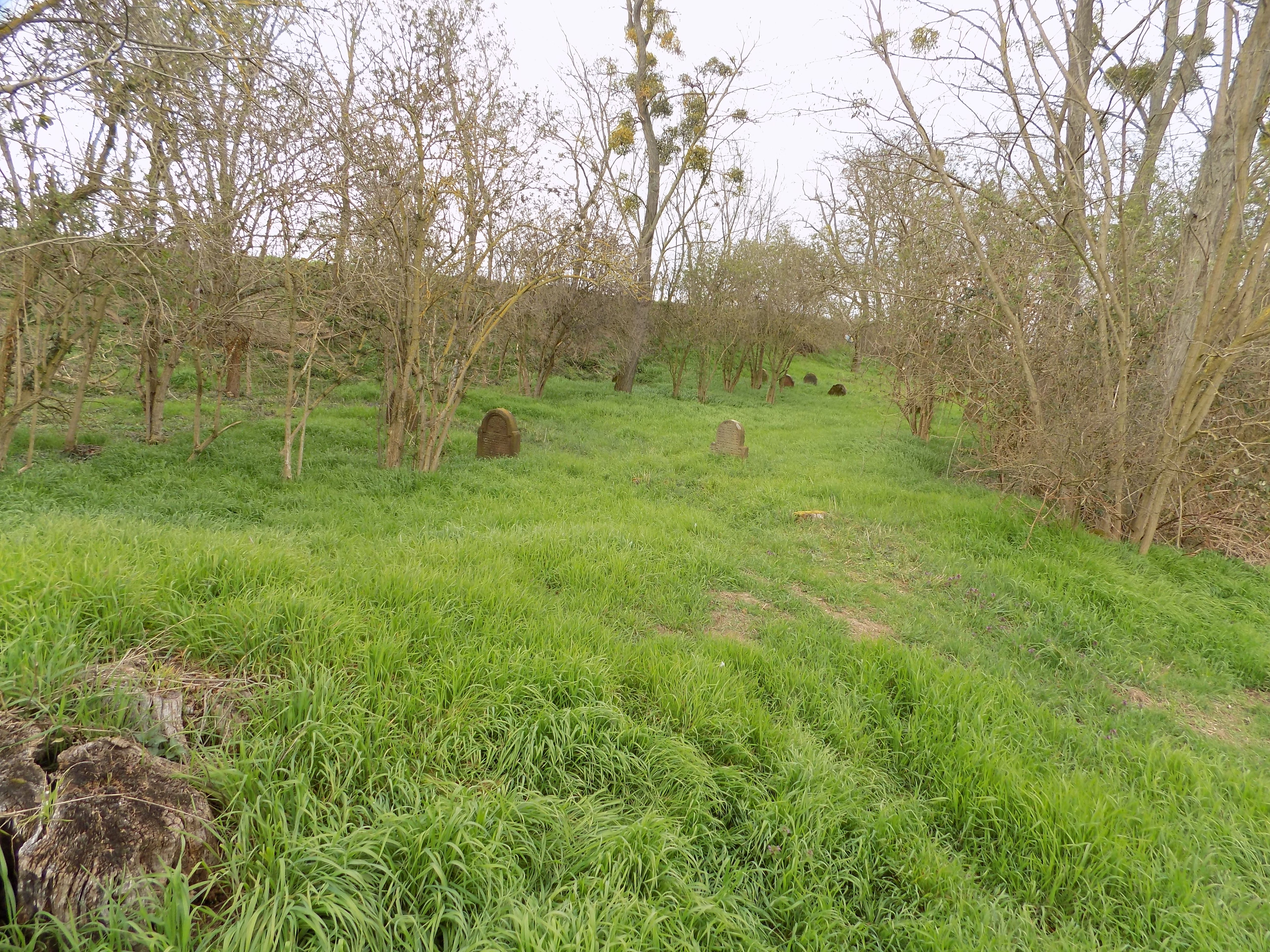 Gräberfeld Jüdischer Friedhof Worms-Herrnsheim